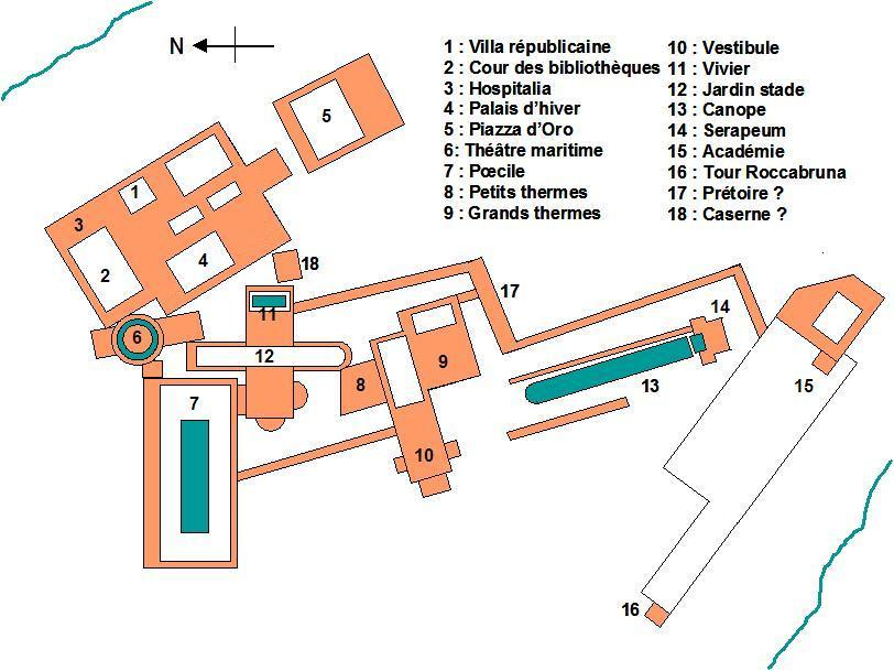 Villa Hadriana approximative map